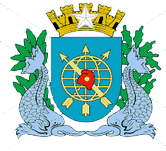 Brasão do Estado da Guanabara (1960–1975)